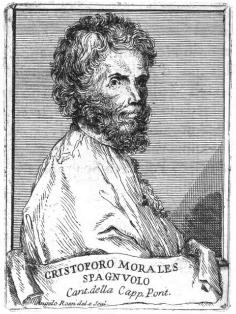 Depicted person: Cristóbal de Morales